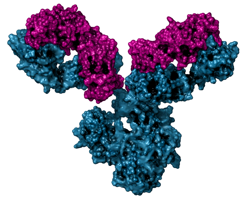 Estructura genérica de un anticuerpo monoclonal